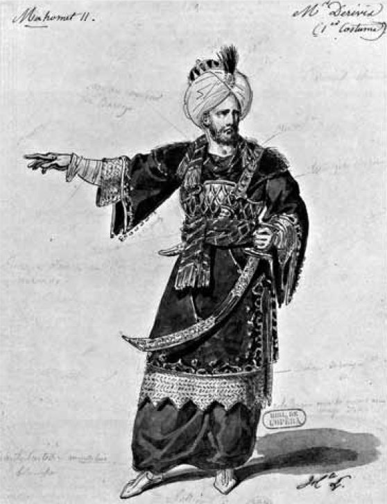 Henri-Etienne Dérivis (1780-1856) im Kostüm des Maometto, dessen erster Darsteller der Hauptfigur in Giacomo Rossinis Oper Maometto II. er war.